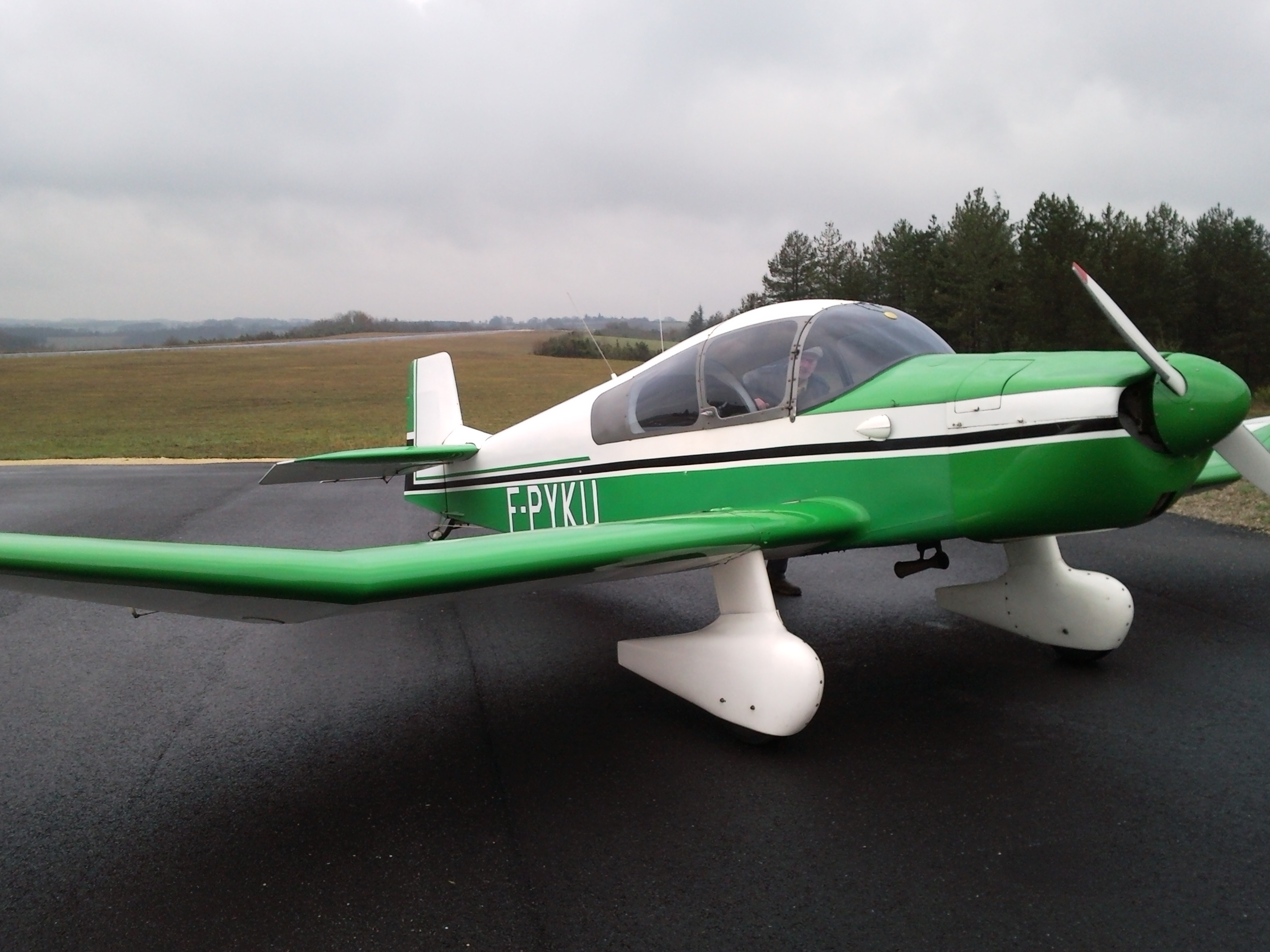 avion leger jodel sicile cnra